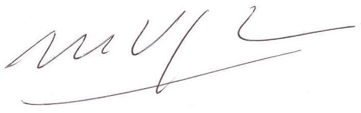 Mario Vargas Llosa signature